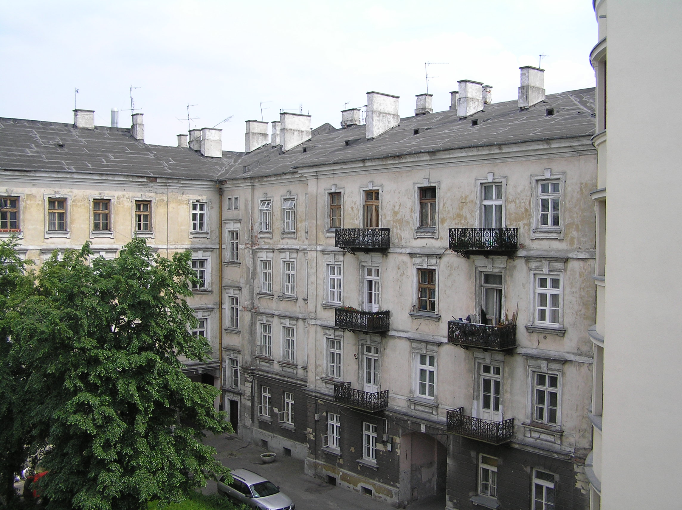 Widok na wewnętrzne podwórze, Kamienica Karmelitów Bosych, Warszawa.